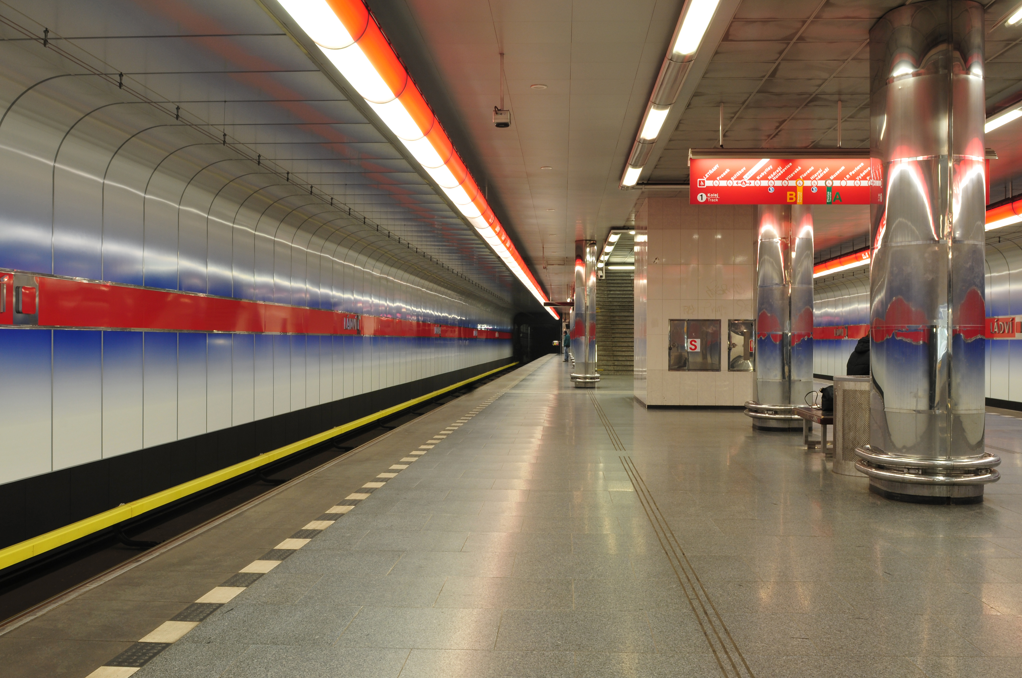 Metro Praha